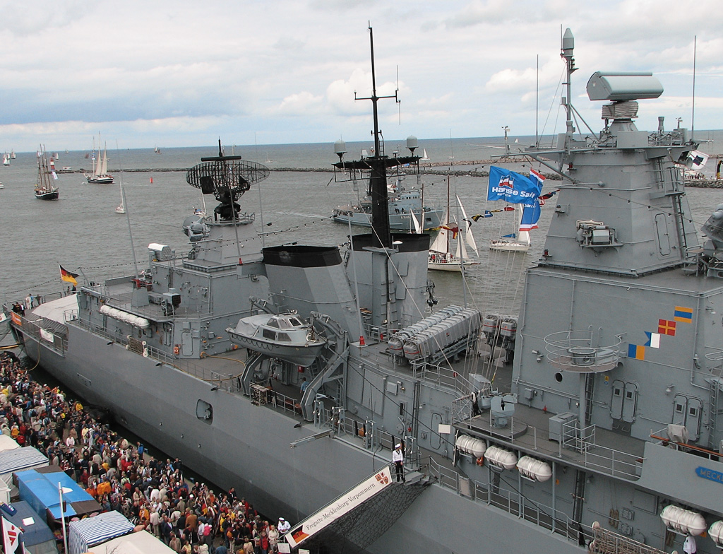 Beschreibung: Heck der Fregatte Mecklenburg-Vorpommern / F218 / Klasse F123 F 218 - a German naval vessel Fotograf: Darkone, 13. August 2005